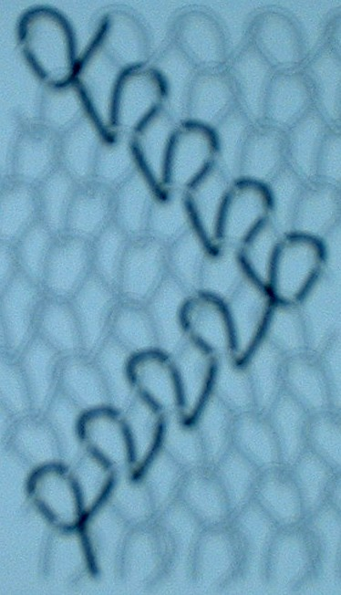 Maschenbild der offenen Atlaslegung